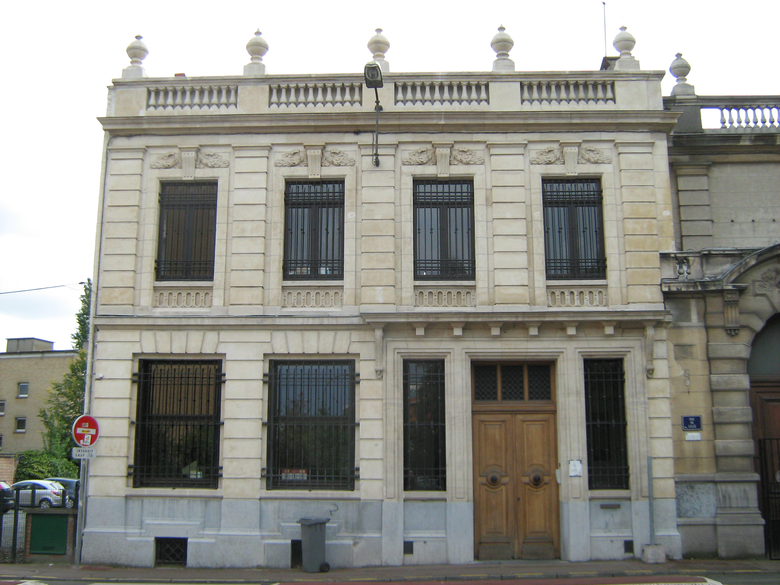 Banque Joire 49 rue de Lille